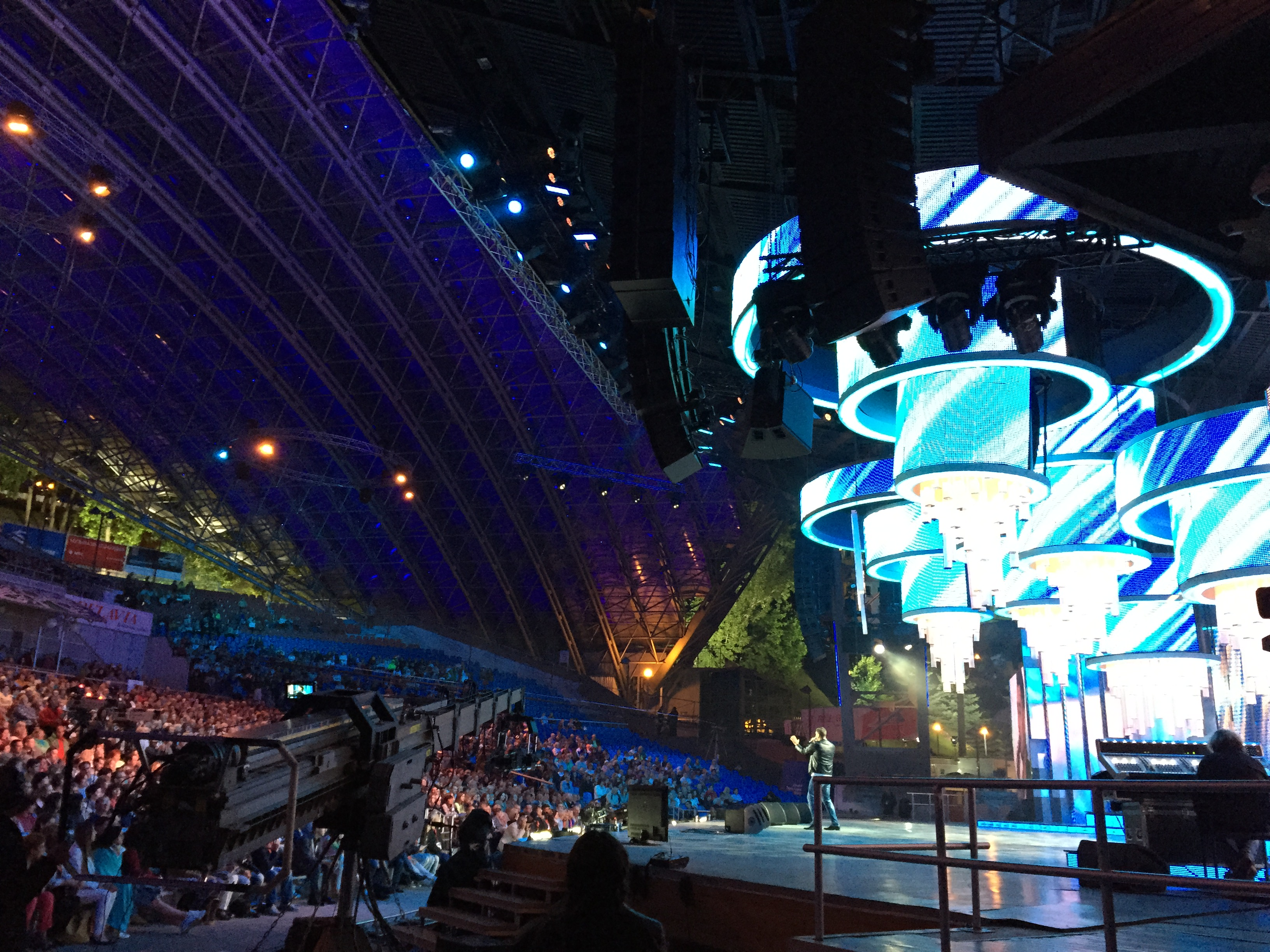 Выступление представителя Болгарии Николая Манолова во второй конкурсный день на Славянском Базаре